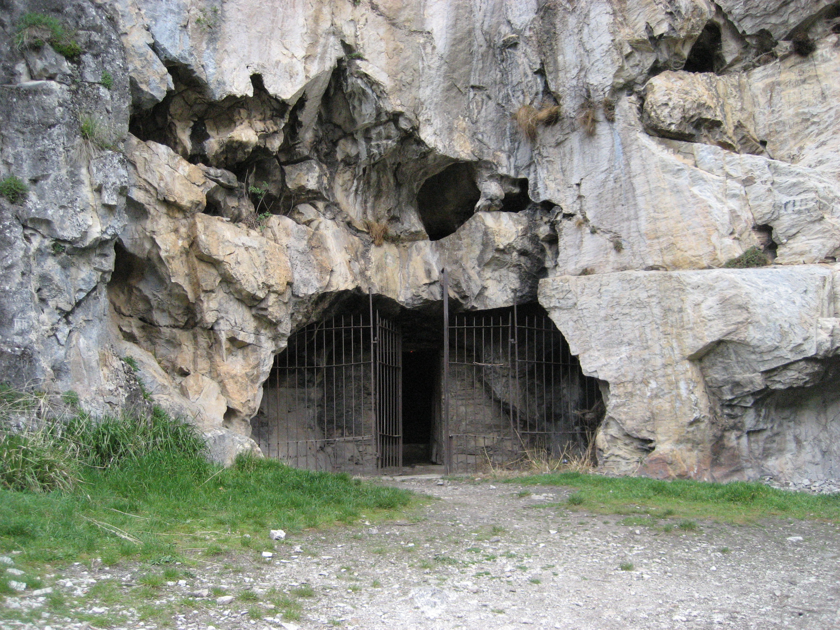 Cueva en la que vivió San Genadio, cerca de Santiago de Peñalba (El Bierzo, León, España).